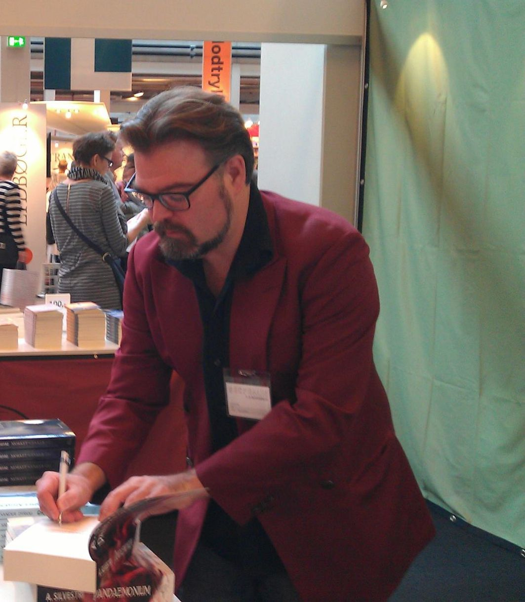 A.Silvestri signerer bøger på BogForum 2014